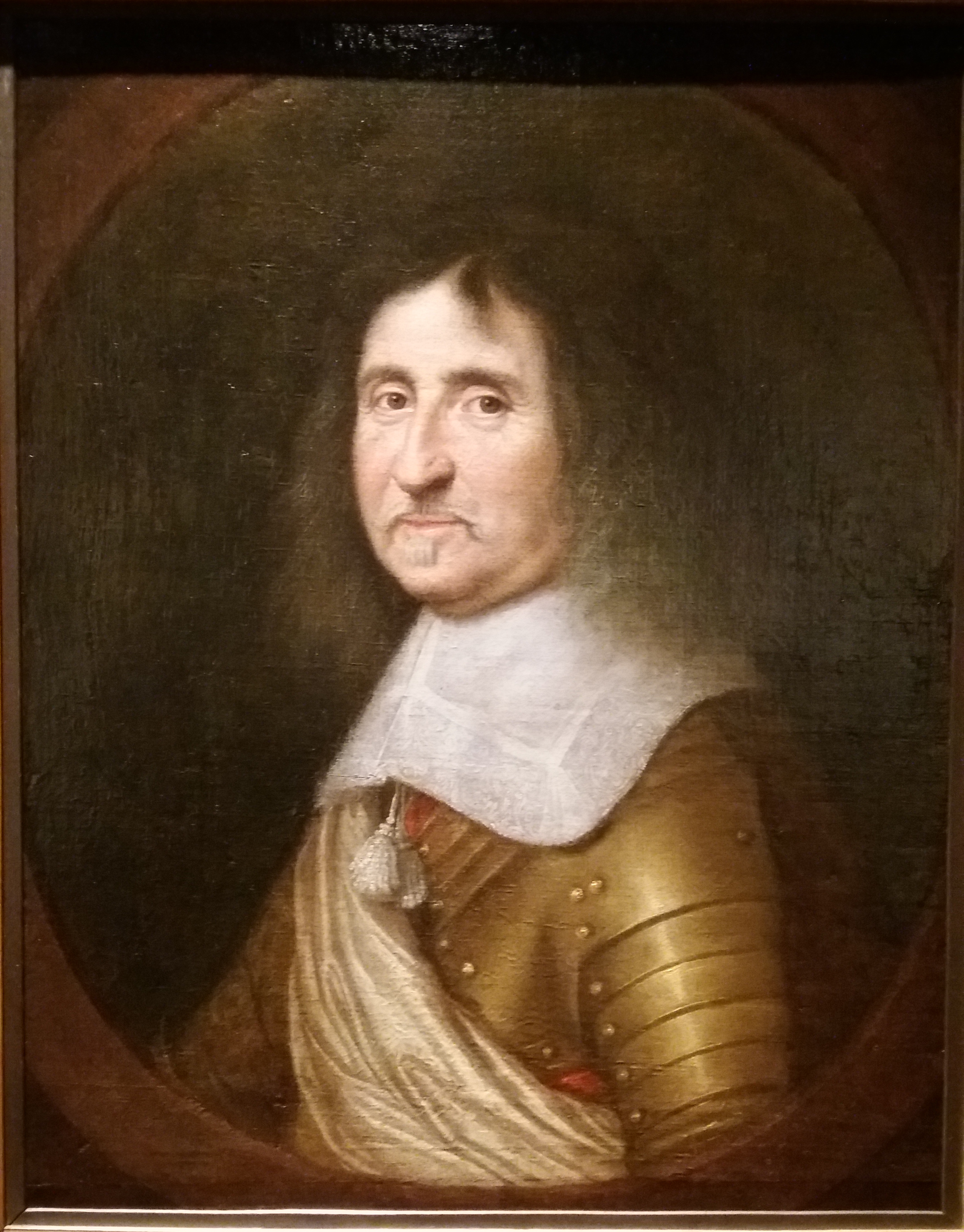 Portrait de Charles de Neuville, marquis de Villeroy et d'Halincourt. Huile sur toile anonyme, origine probable : couvent des Carmélites. Musées Gadagne, inventaire : N.2661.